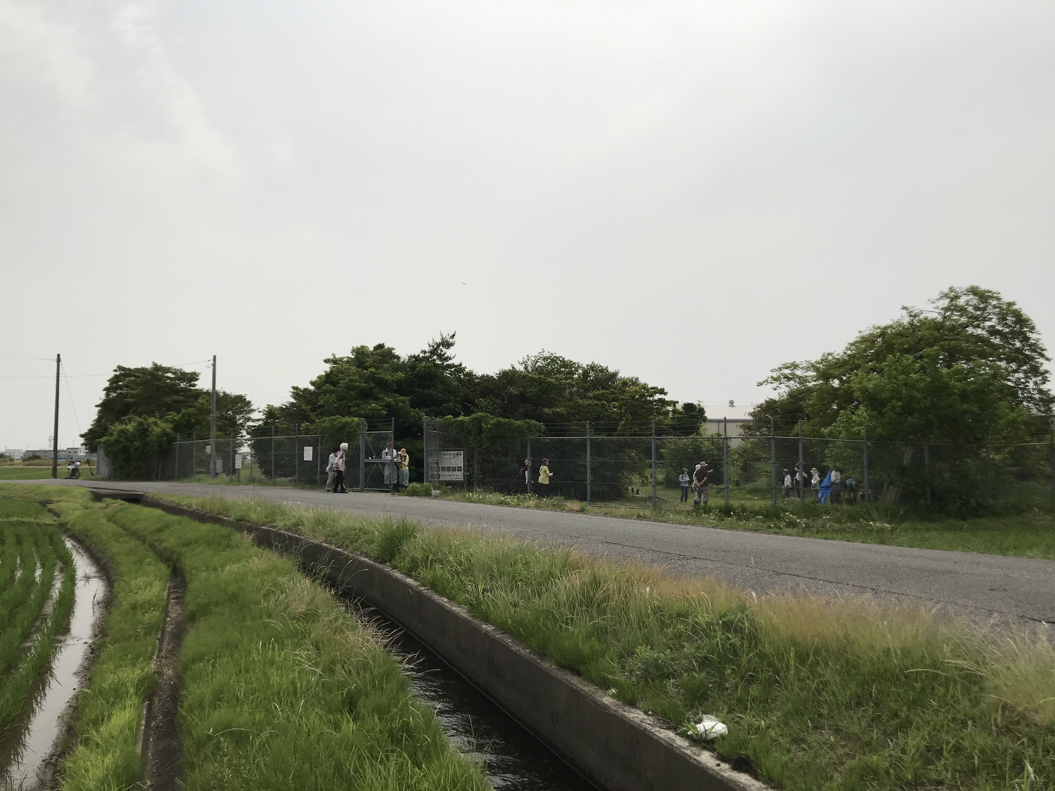 前面道路から入口を望む